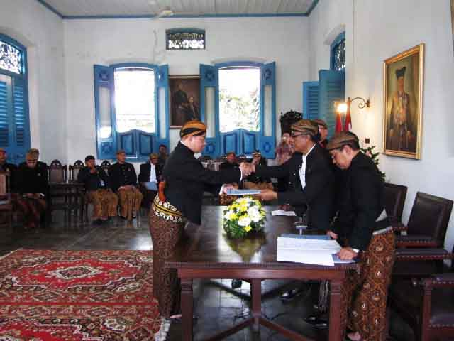 Johan Yan Mendapatkan Gelar Kehormatan dari Pakubuwono XIII Solo dalam Bidang Budaya